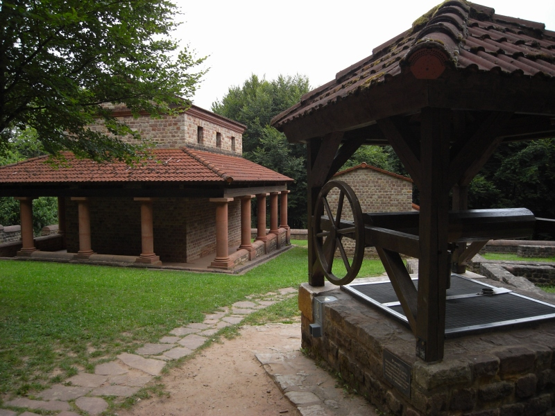 Der Merkurtempel von hinten, rechts der Brunnen, Tawern